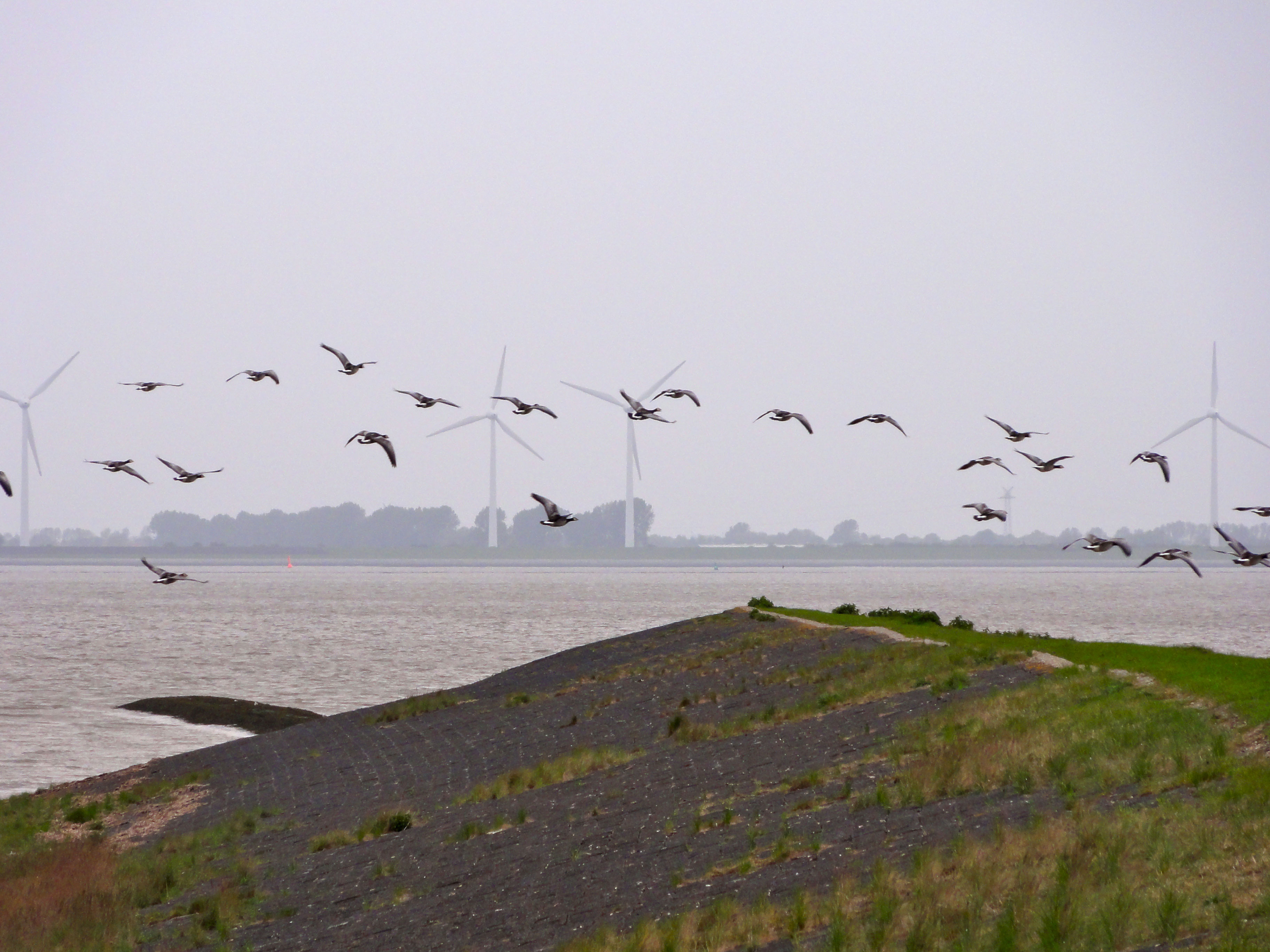 De Punt van Reide in de provincie Groningen